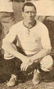 Guillermo Dannaher futbolista argentino que jugó en Huracán